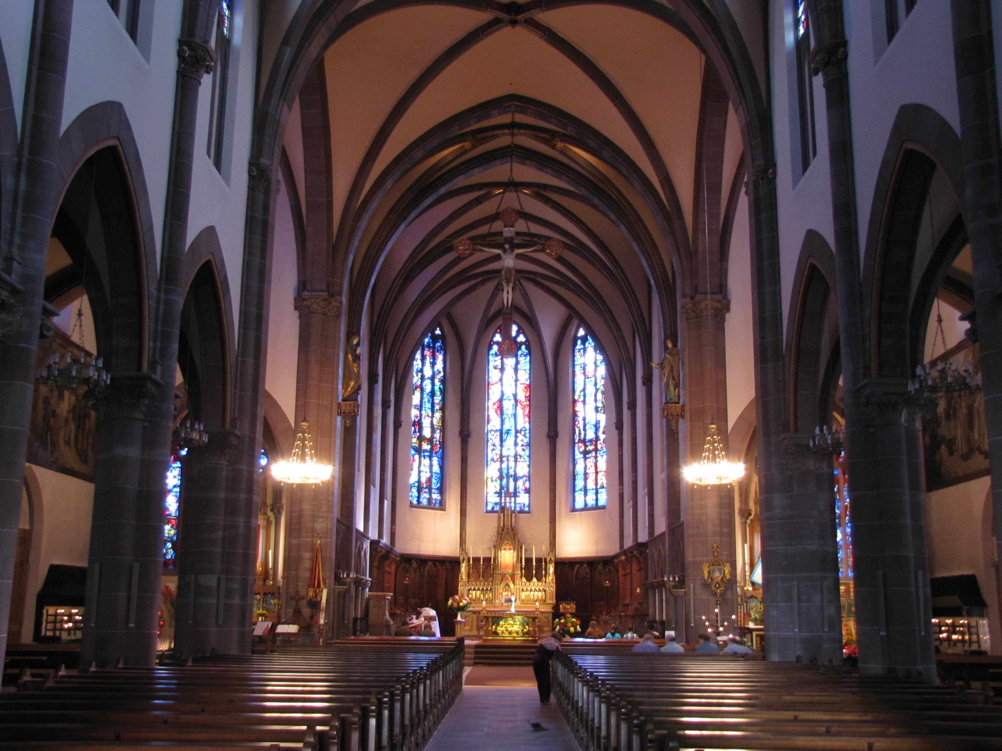 Alsace, Bas-Rhin, Haguenau, Basilique Notre-Dame-des-Douleurs de Marienthal (ancien Prieuré des Guillemites) (IA00062022): Vue intérieure de la nef vers le chœur.